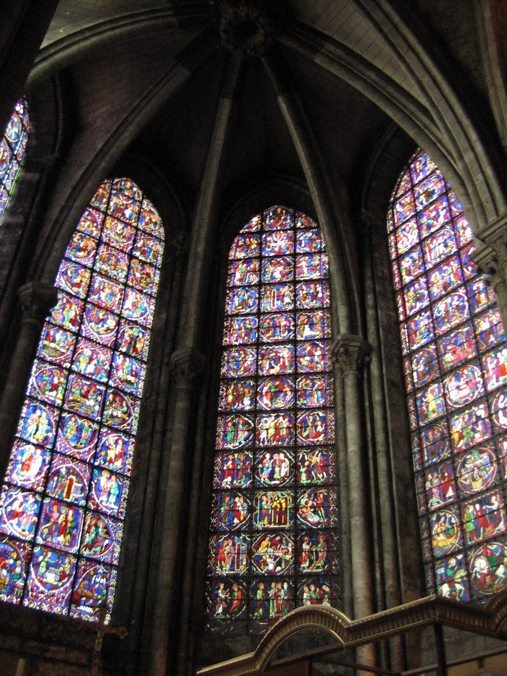 vitraux du chœur de la cathédrale de Chartres, Eure-et-Loir (France).